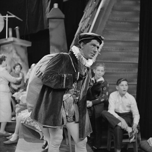 Henk Elsink als Zwarte Piet tijdens opnames voor Sinterklaas is jarig in 1959.